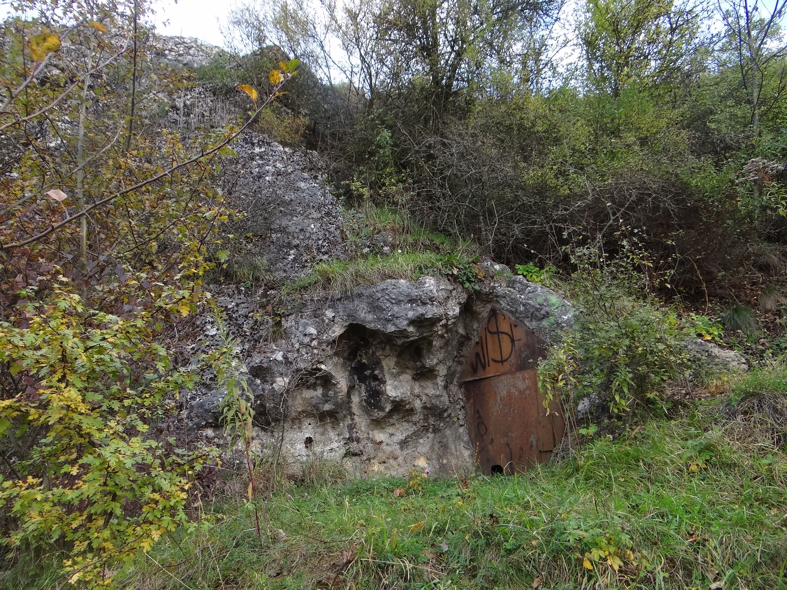 Łom Bergera na Księżej Górze w Pychowicach (Kraków)